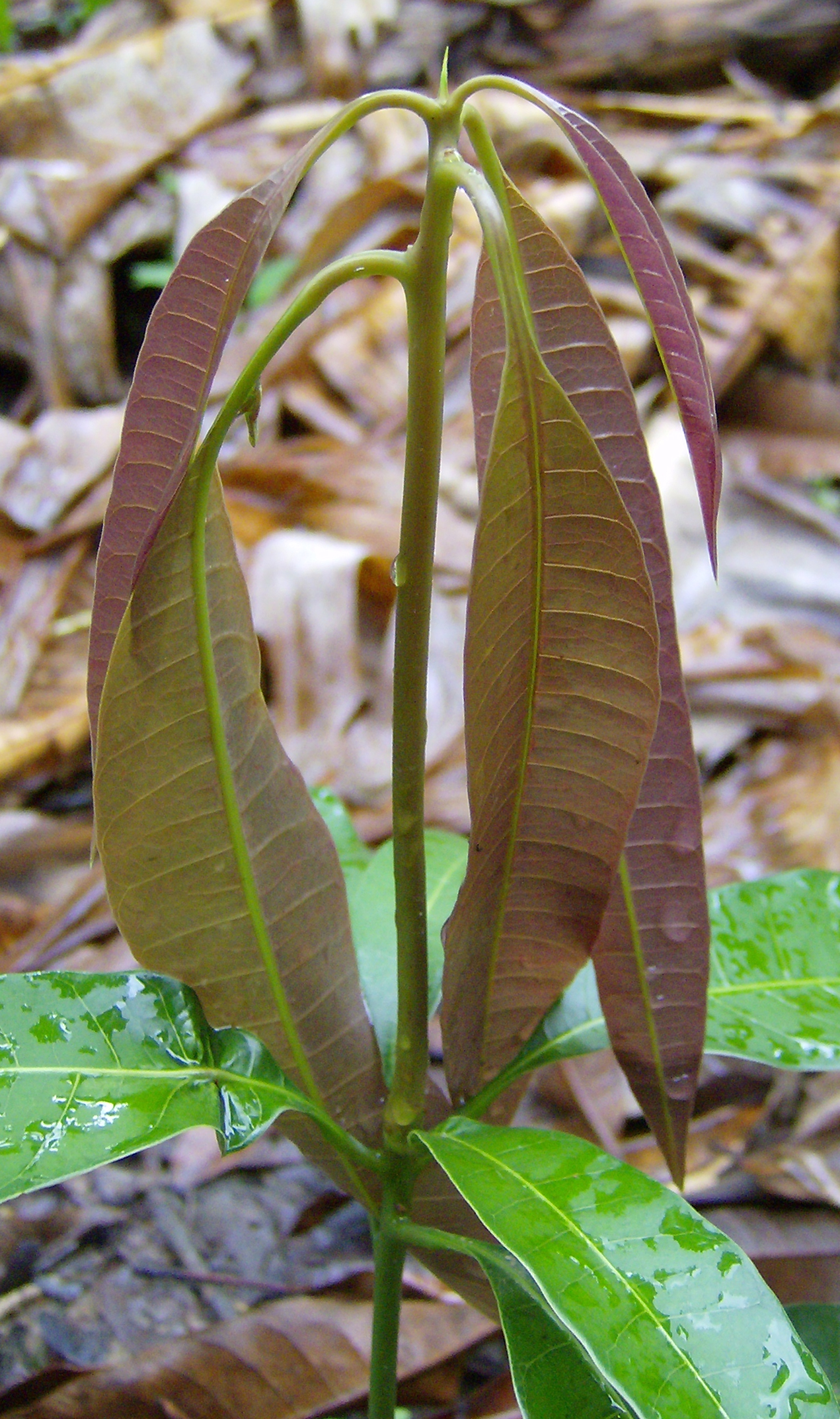 Mangifera o planta de Mango en su etapa inicial de crecimiento